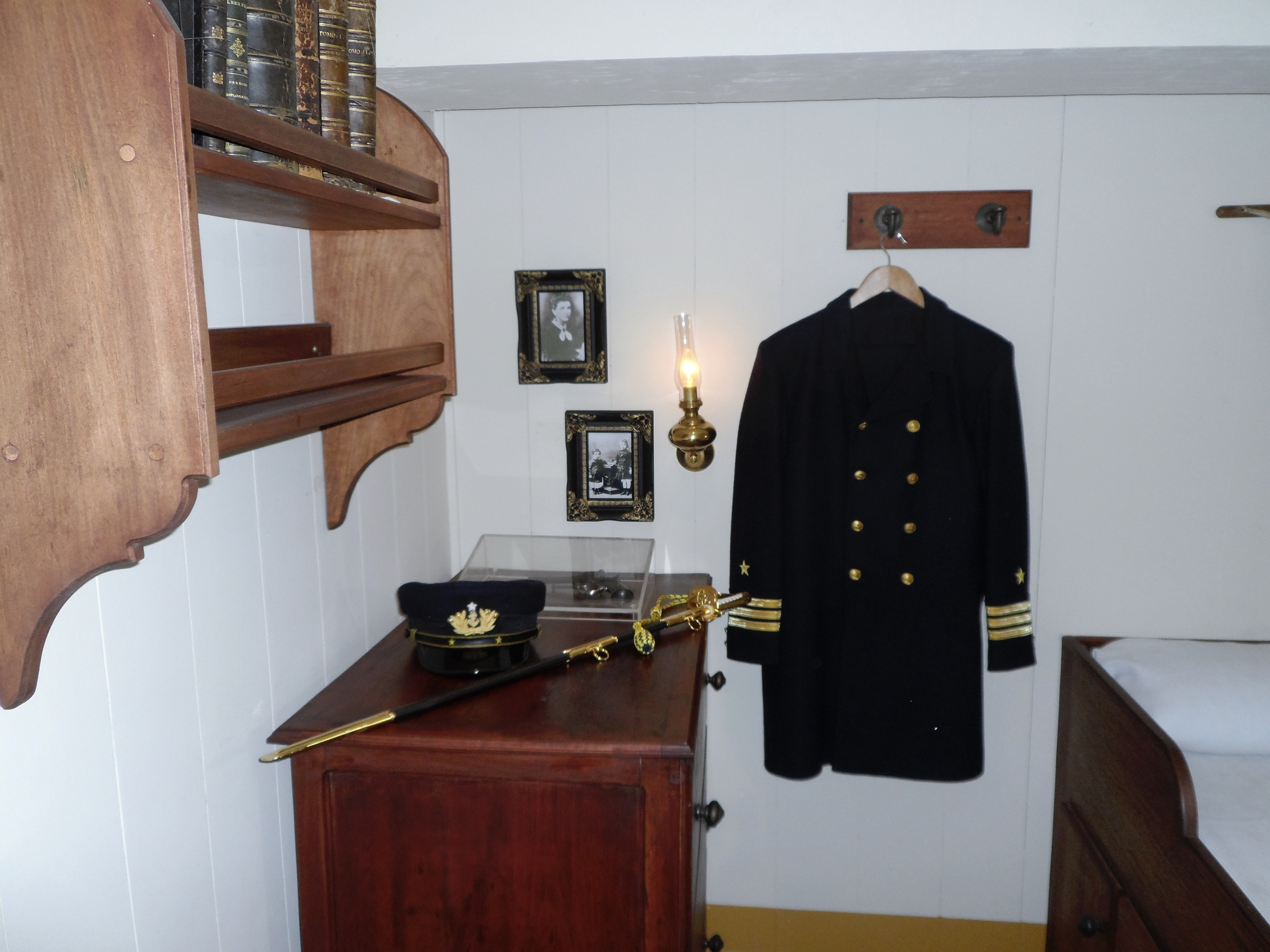 Camarote del Capitán Arturo Prat. Museo corbeta Esmeralda. Paseo A. Lynch. Iquique, I región.